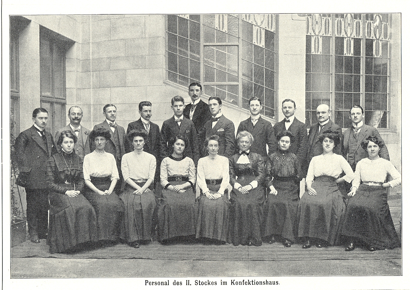 Персонал торгового дома Бройнингер,1888 год